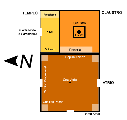 Esquema de un conjunto monasterio del siglo XVI en la Nueva España.